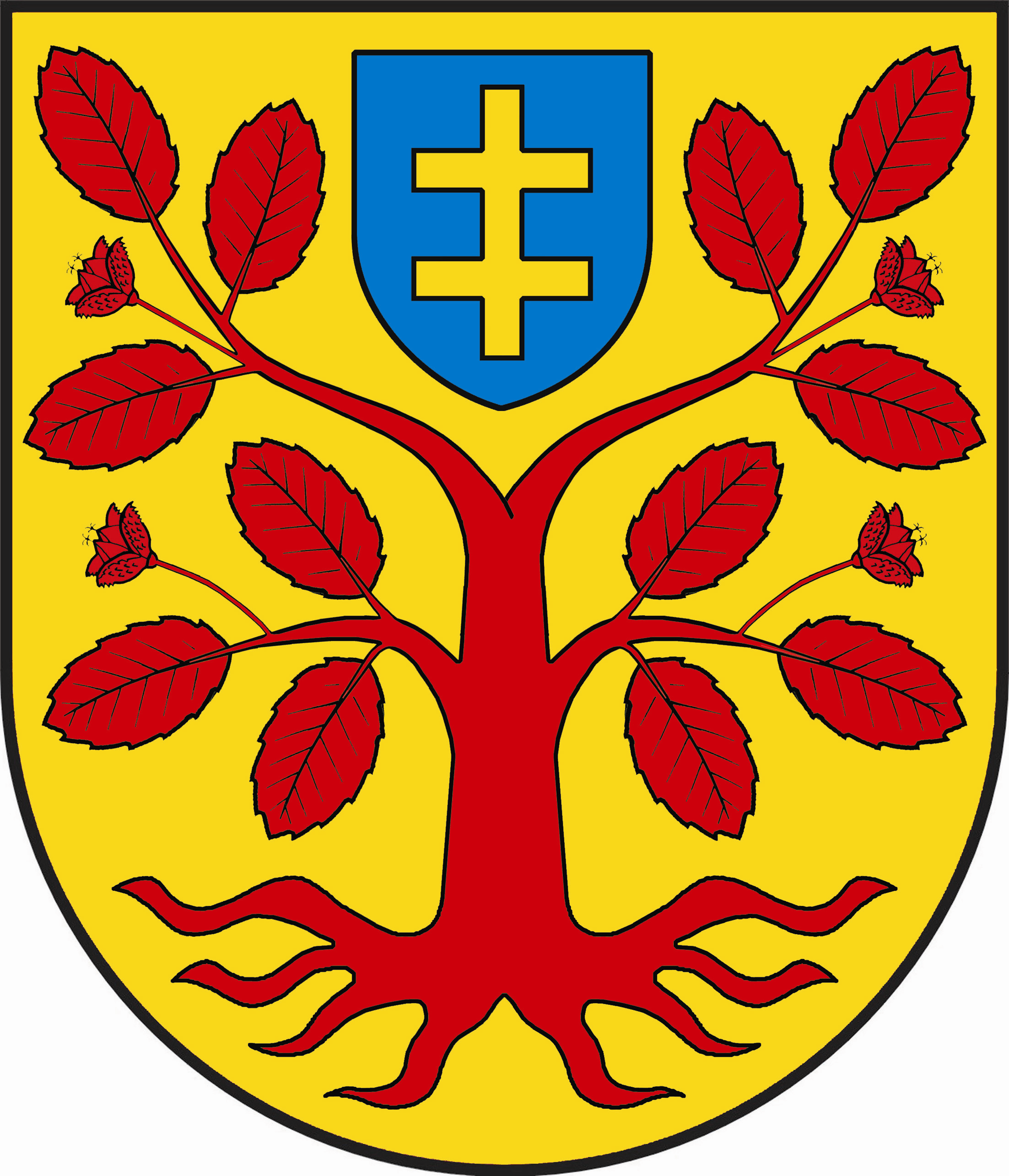 Herb gminy Zbuczyn